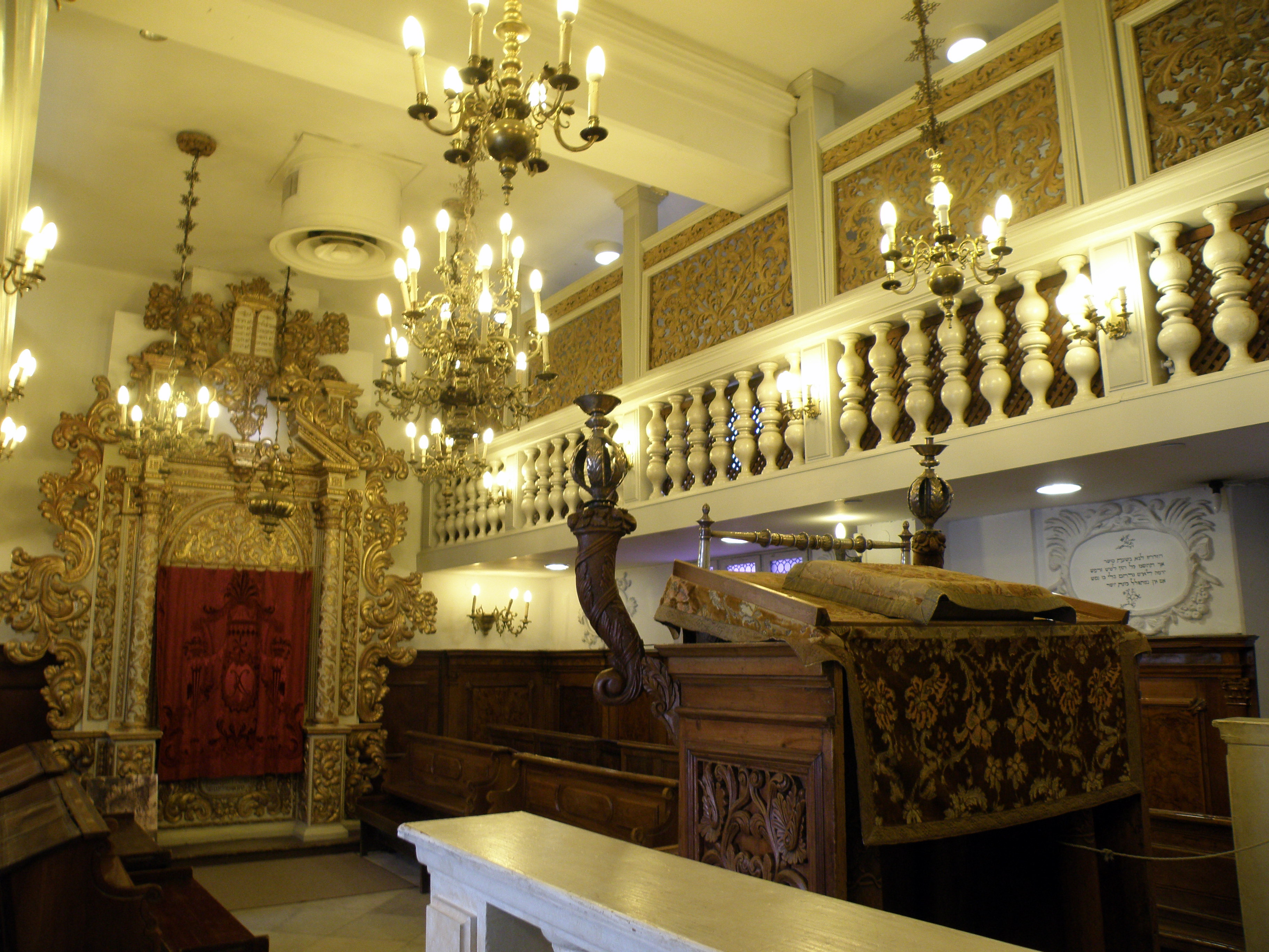 בתים מבפנים 2010